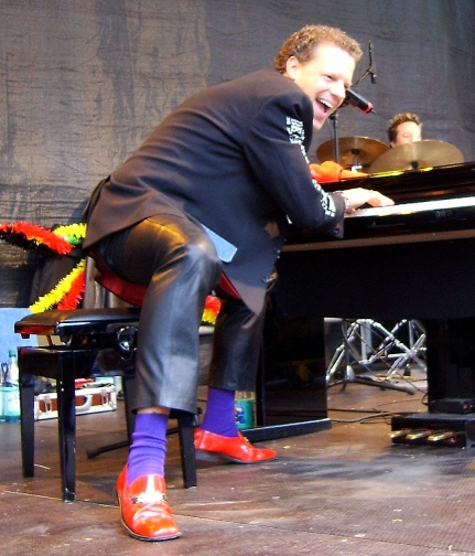 German Boogie-Woogie pianist (Stadtfest)